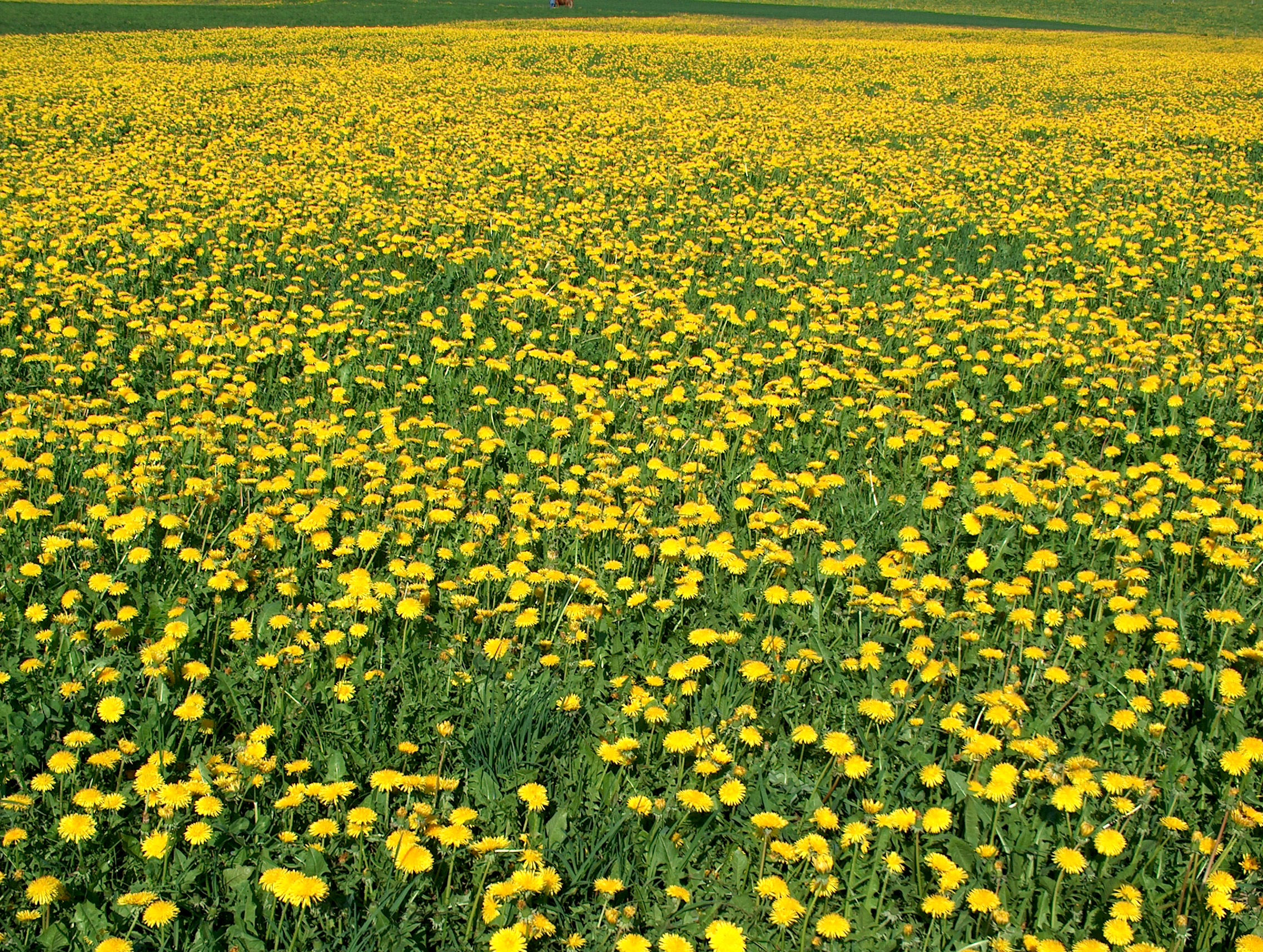 Blühender Löwenzahn (Taraxacum officinale)im Frühling.